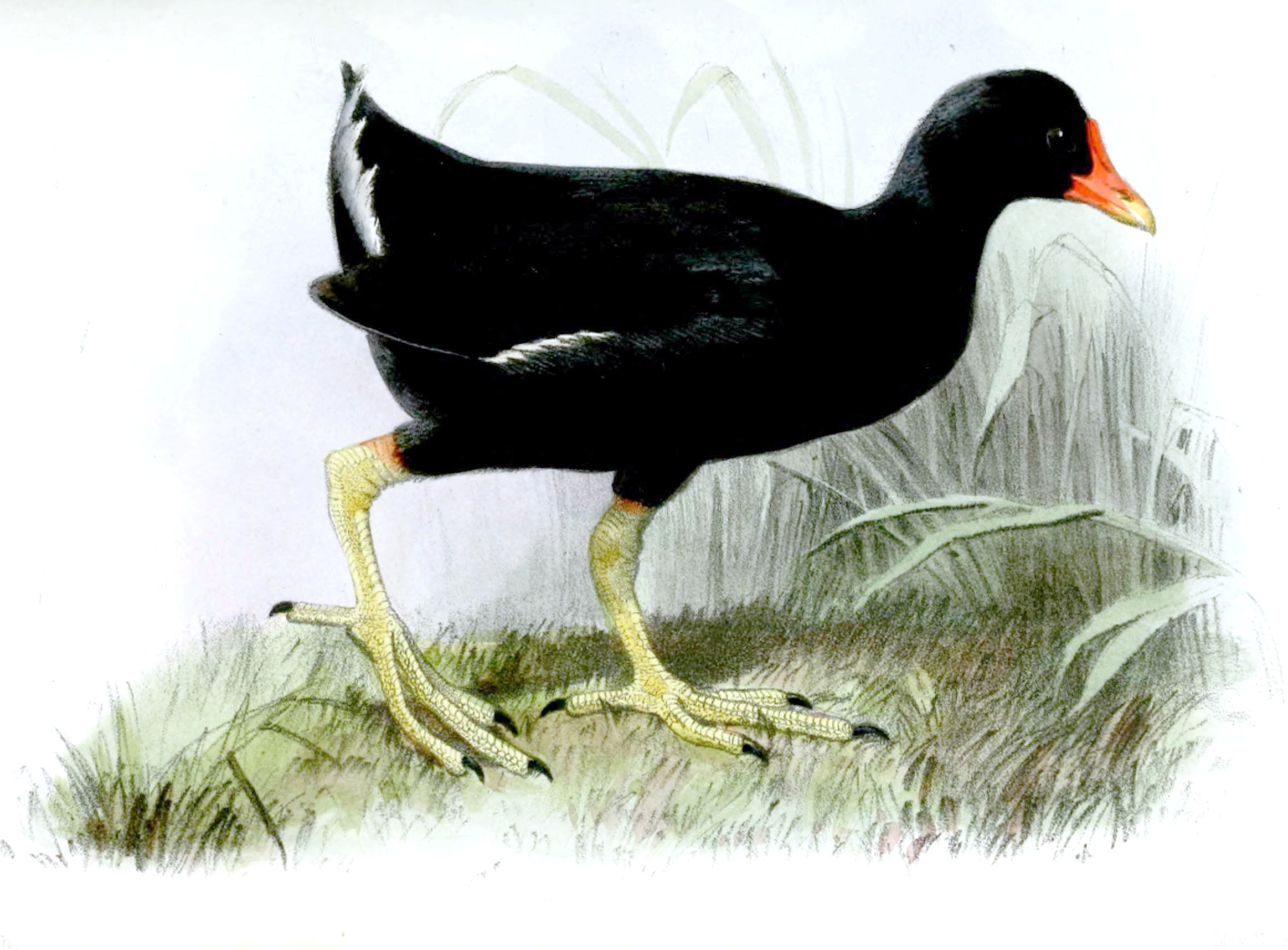 Gallinula nesiotis